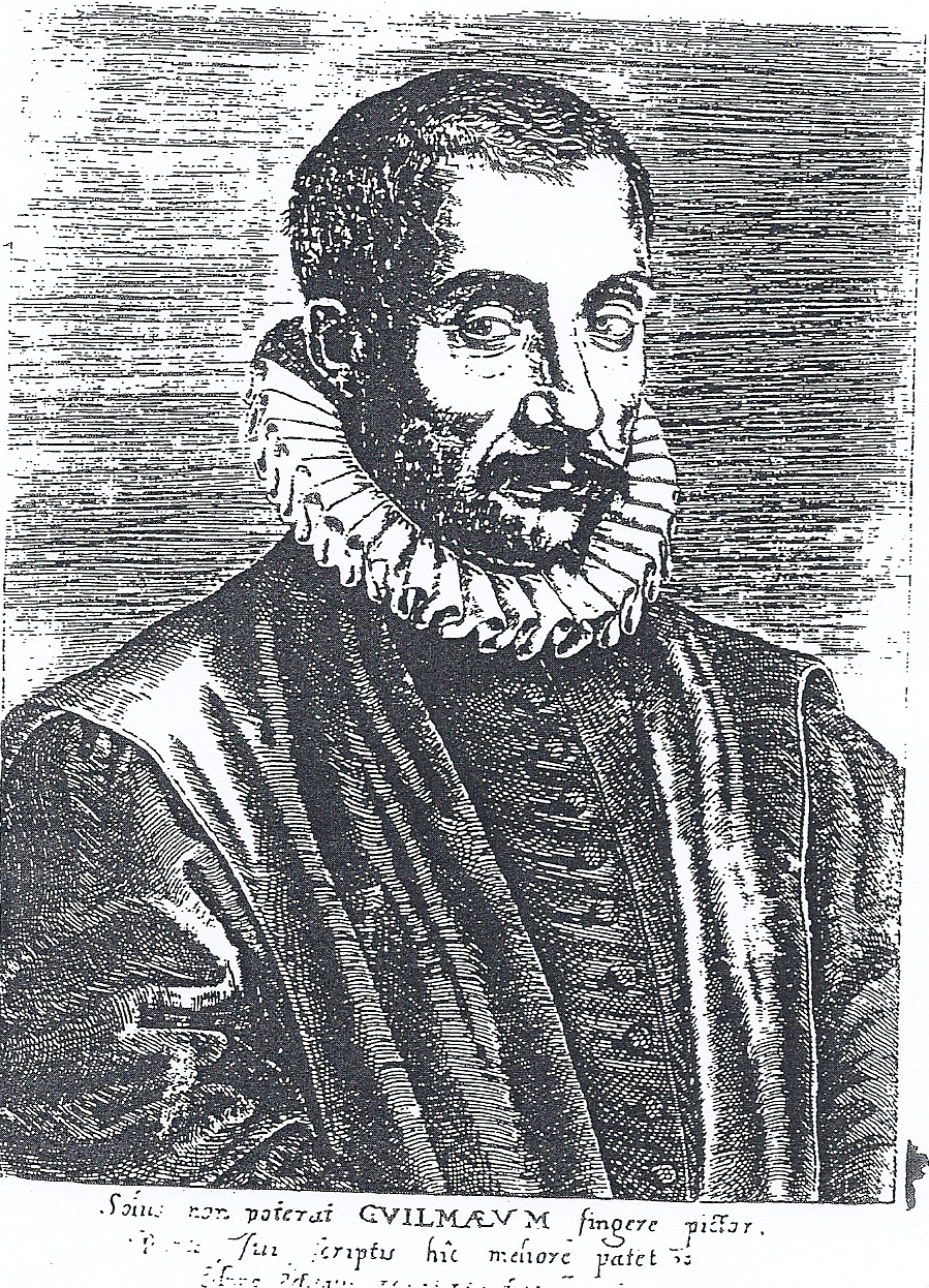 Portrait de Jacques Guillemeau